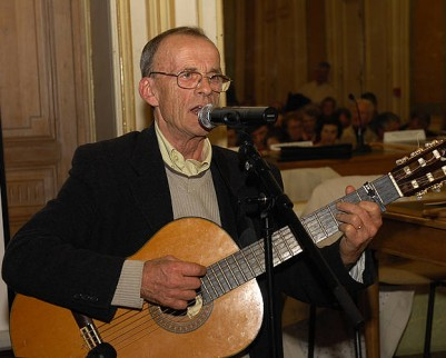 Manex Pagola gitarra jotzen. Taken from badok.eus, webpagen under a CC-BY-SA 3.0 license (